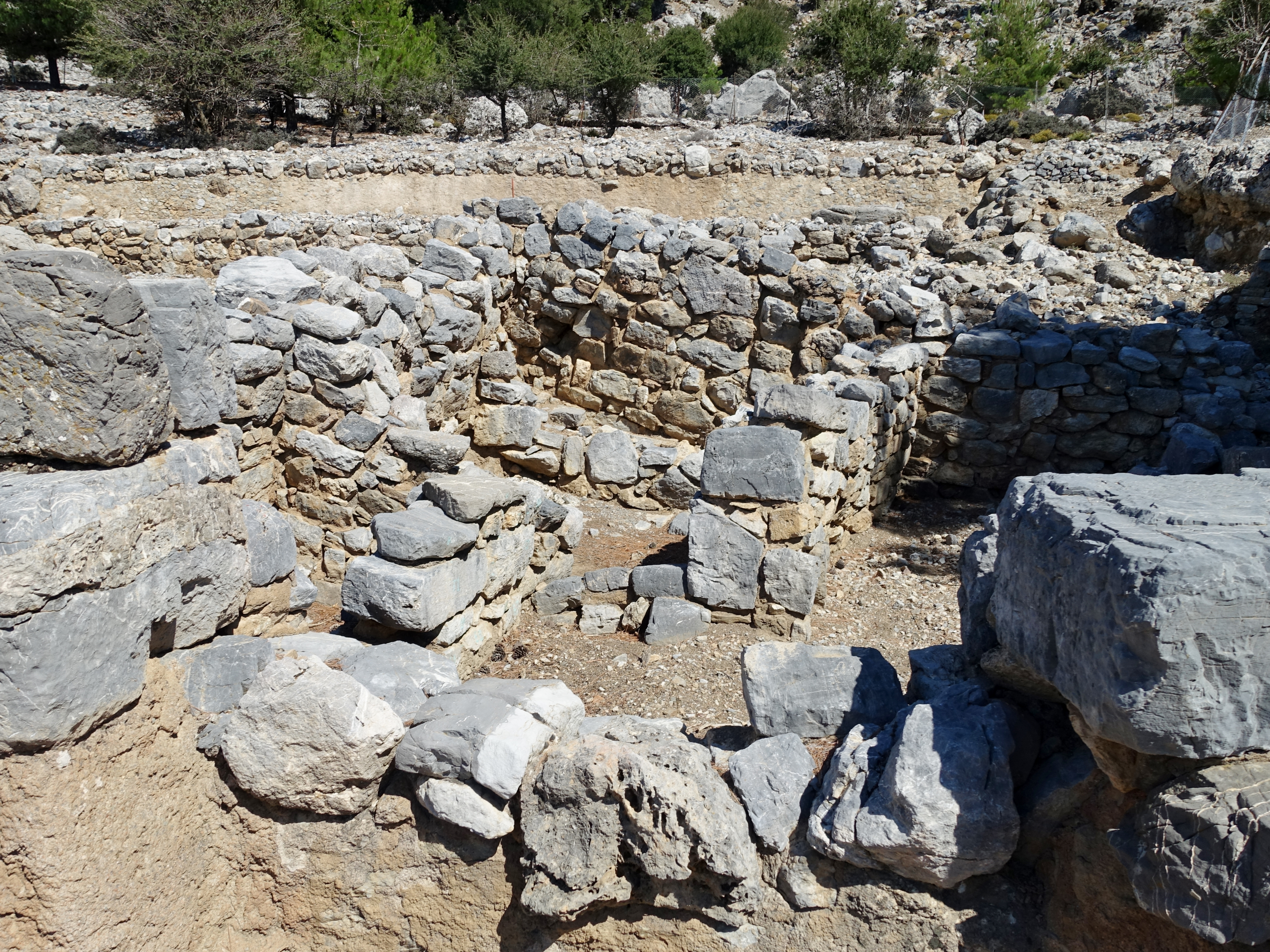 Heiligtum des Hermes und der Aphrodite oberhalb des Ortes Kato Symi (Κάτω Σύμη), Kreta, Griechenland